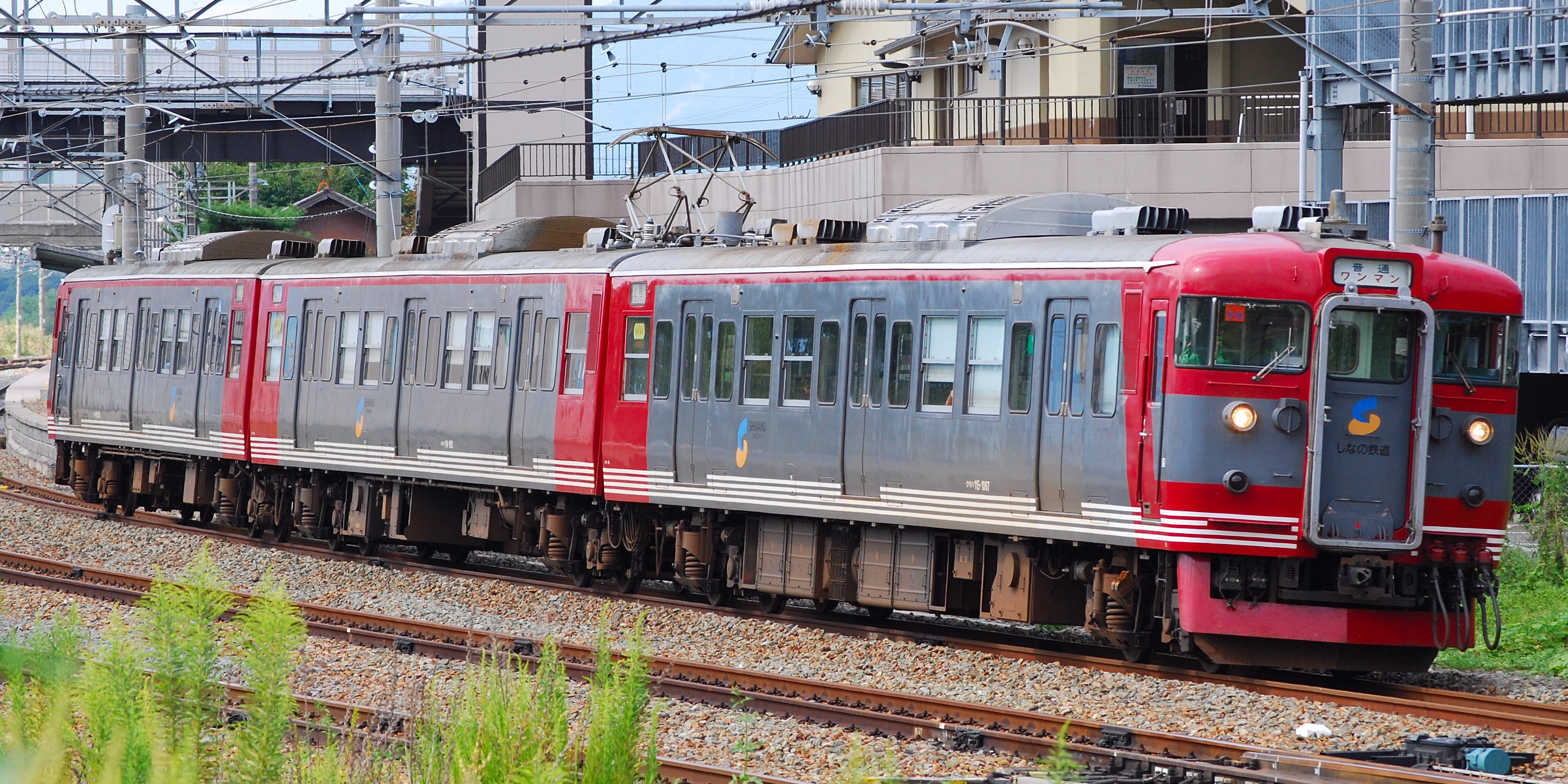 しなの鉄道115系